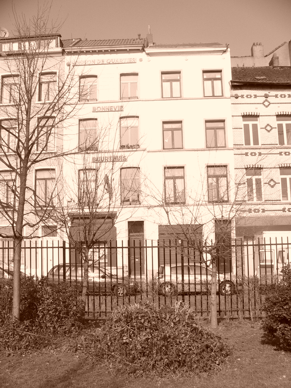 Auteur Mario scolas